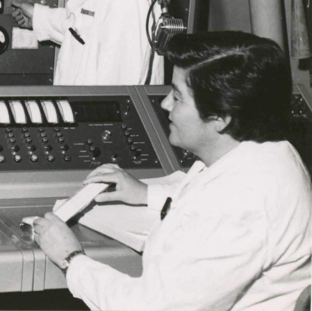 מדענית הגרעין אביבה גלעדי, חוקרת בטכניון, בעת עבודה עם קולגות במרכז למחקר גרעיני בנחל שורק